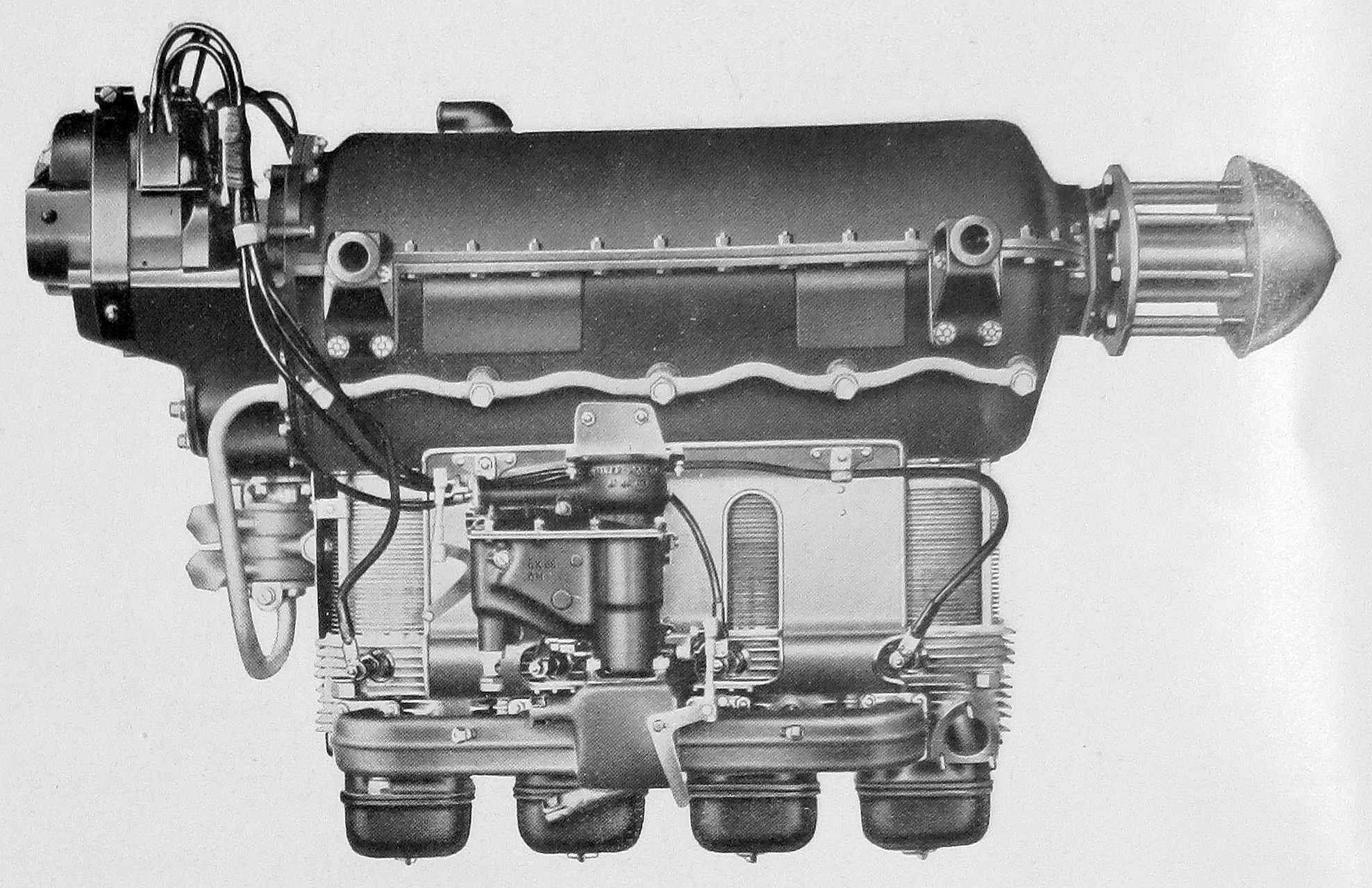 letecký motor Walter Minor 4 (1936)